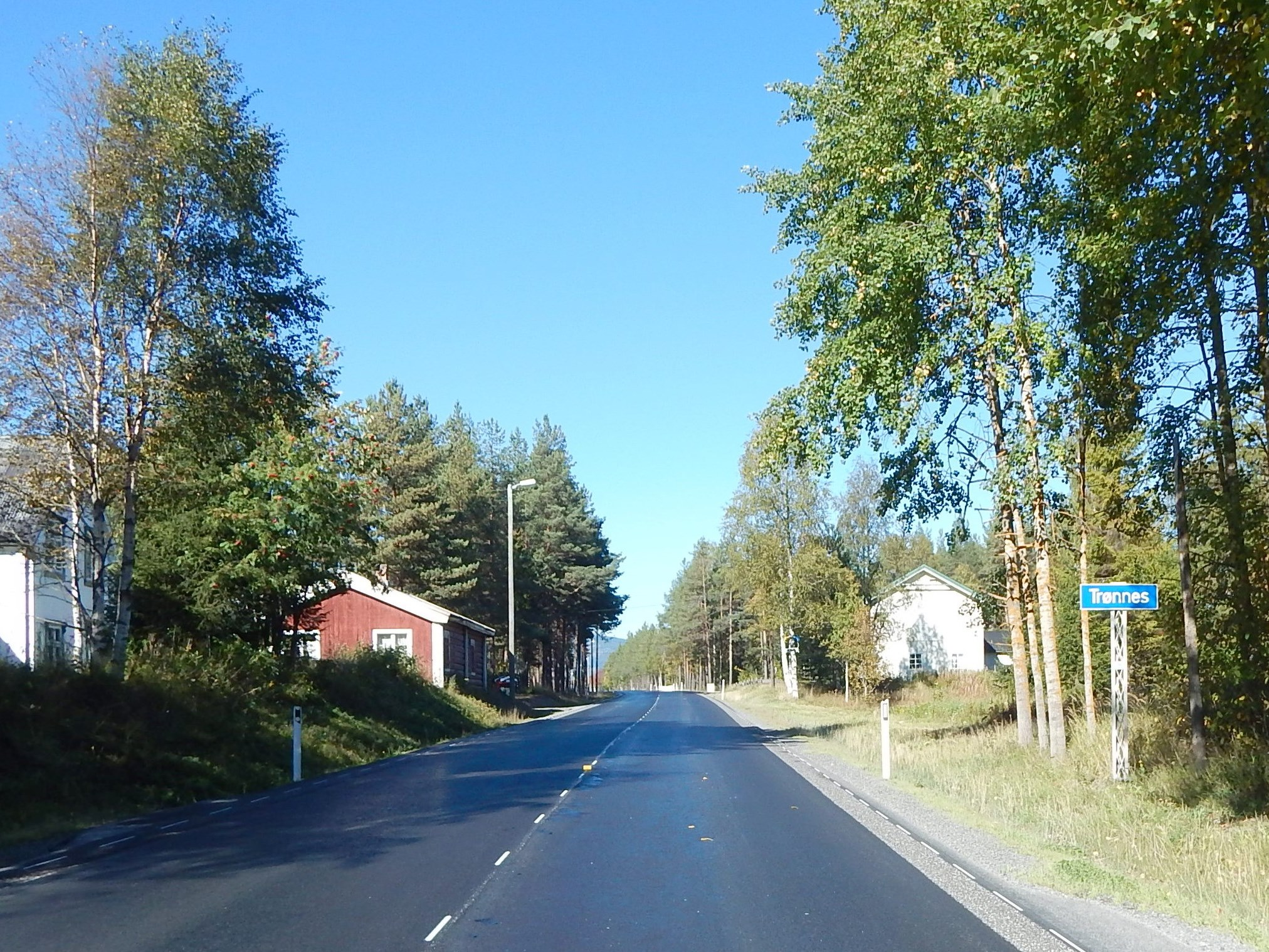 Riksvei 3 mot Trønnes sørfra